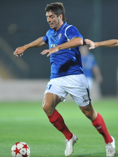 Антон Павлович Шиндер — украинский футболист.